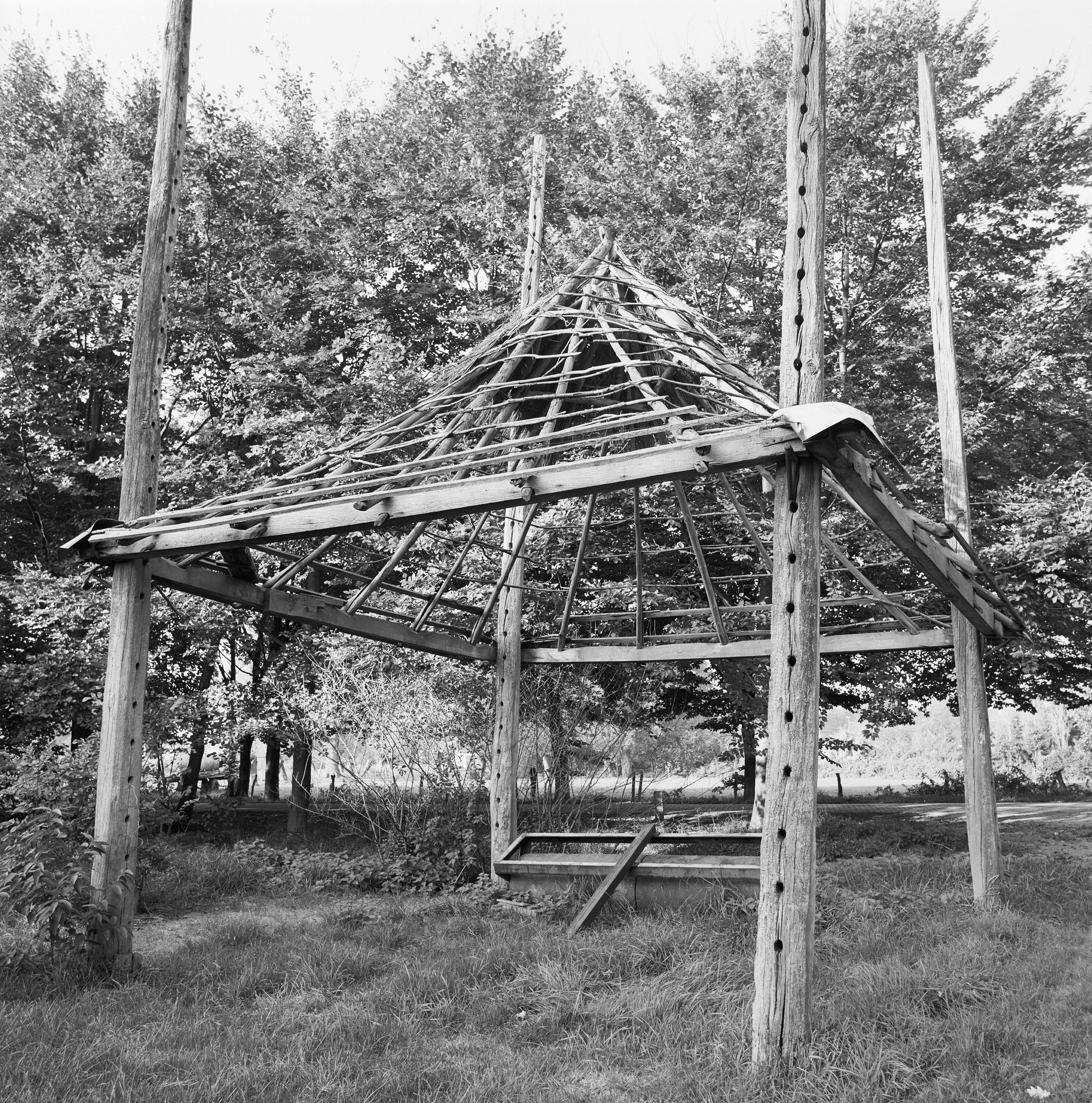 Exterieur HOOIBERG